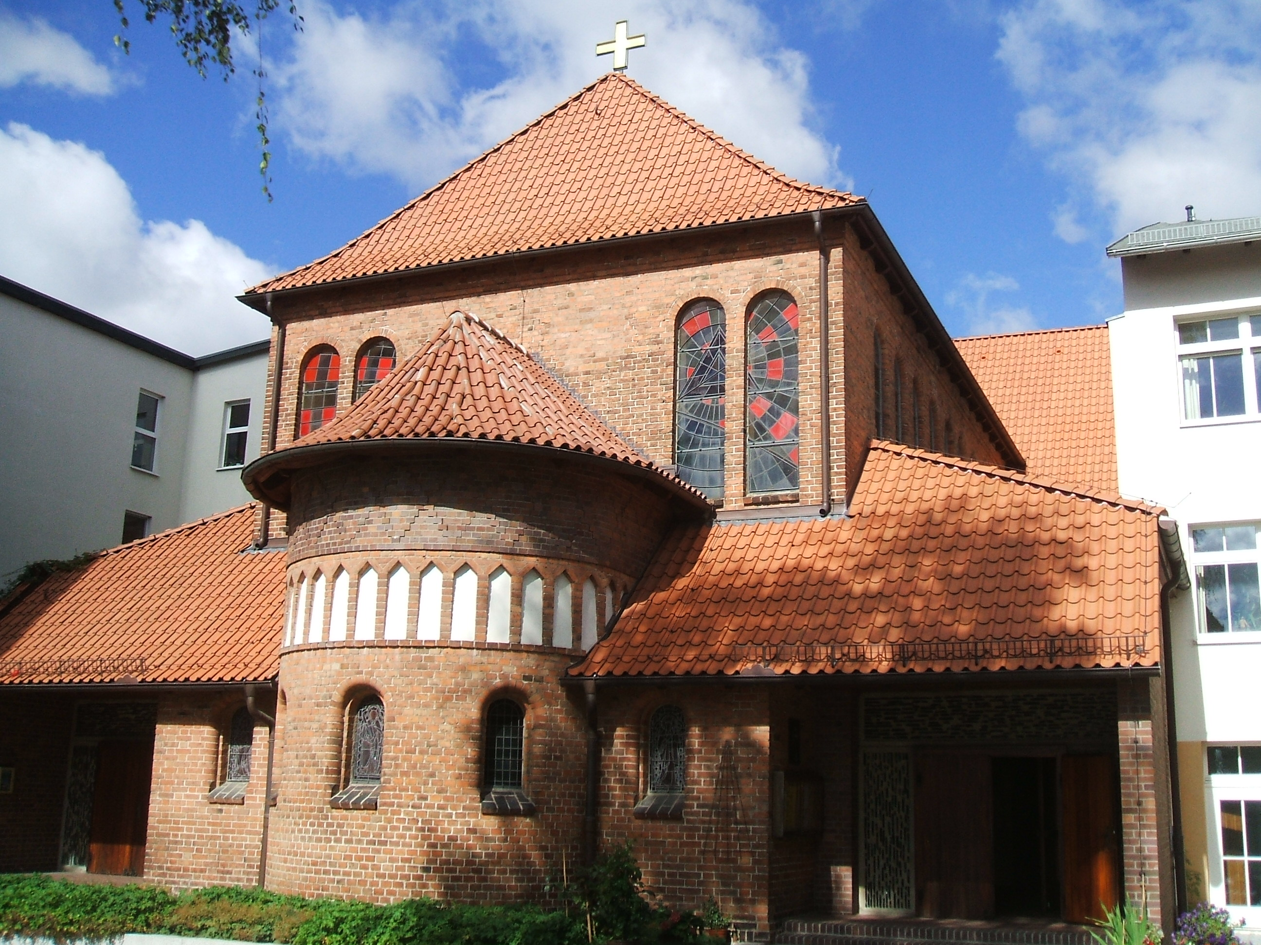 Die Stralsunder katholische Dreifaltigkeitskirche